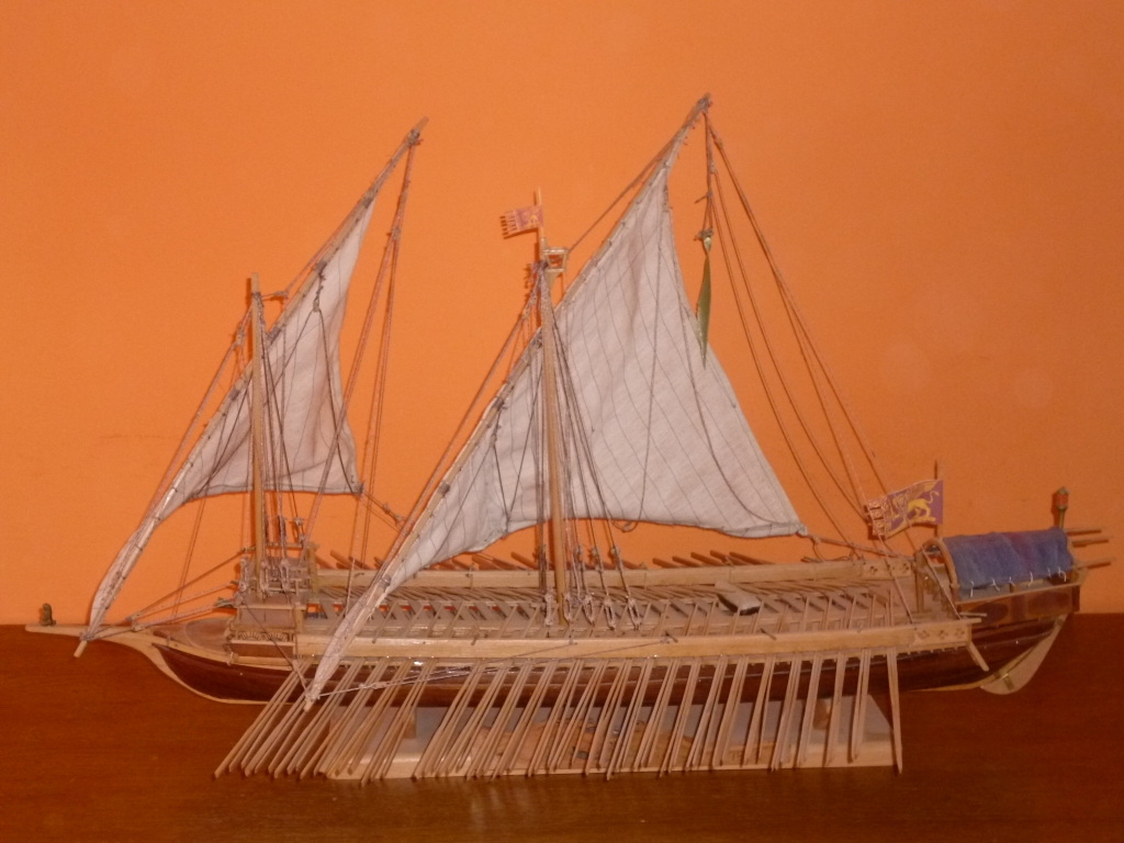 Maketa trogirske galije "La donna", potopljena 1571. kod Lapanta